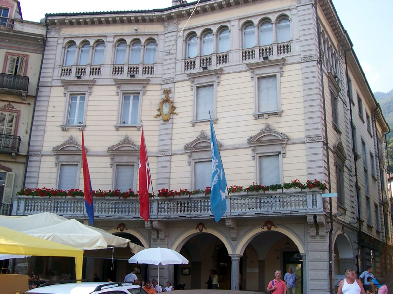 Locarno - Municipio